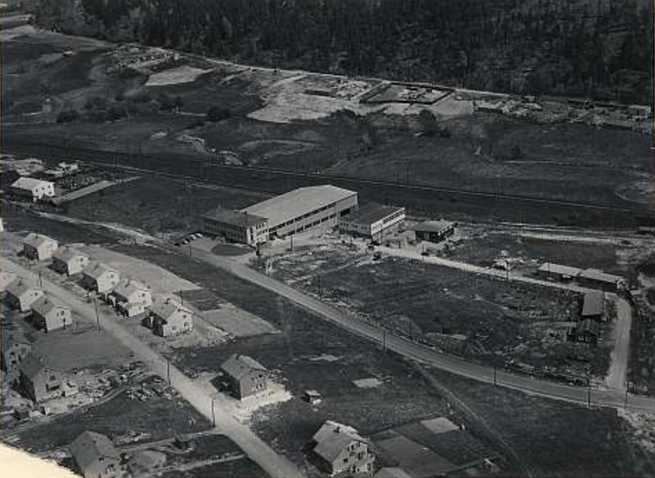 Ole Deviks vei med Hanken. I forgrunnen: Harald Halvorsens vei. Foto Vilhelm Skappel/Widerøe. Fra Oslo byarkivs samling i Digitalt museum.